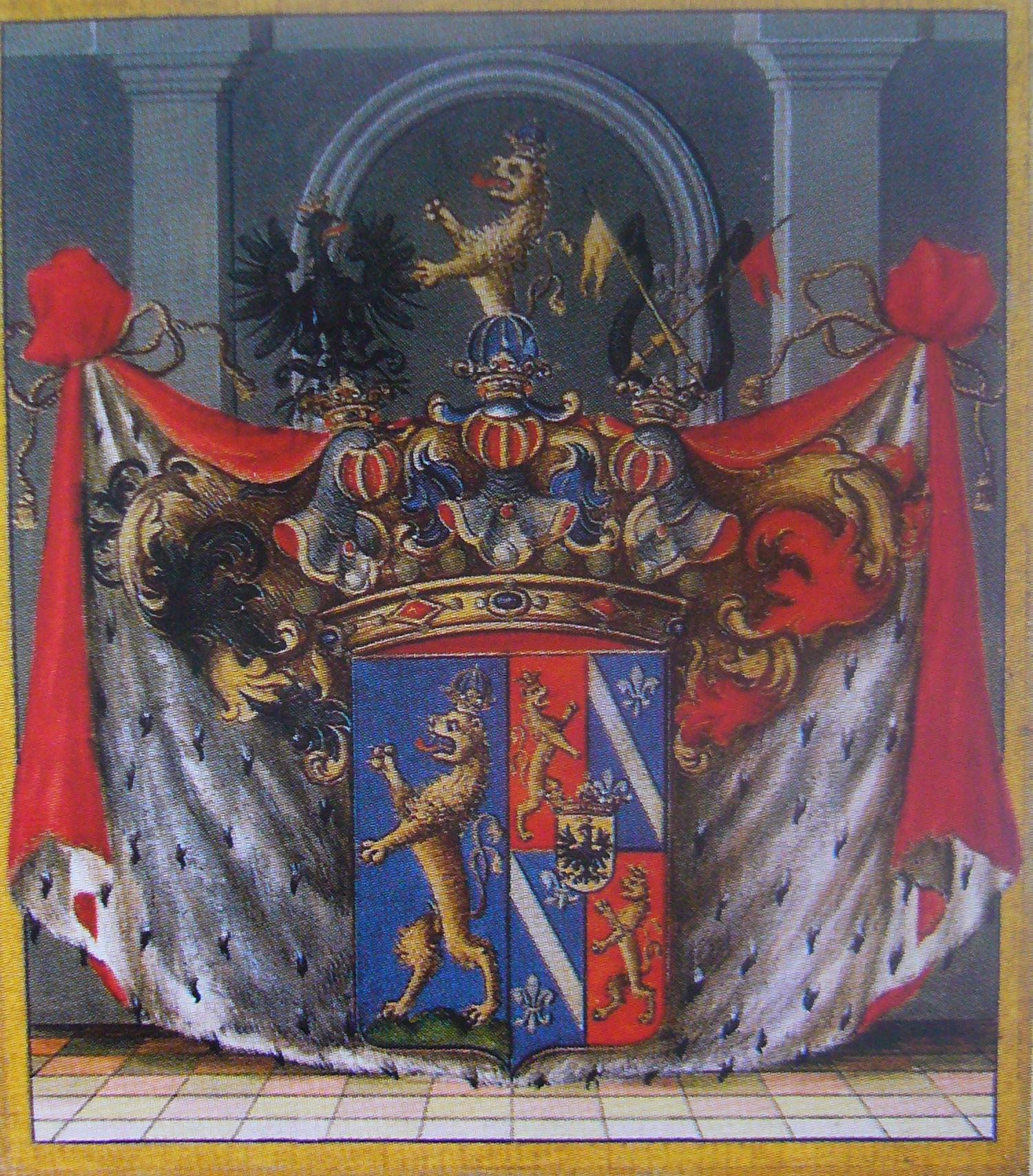 Bécs, 1740. 2. 23., IV. Károly császár címerbővítő oklevele gróf Jan Ludvík ze Žerotína számára, melyben megengedi, hogy címerét a Lilgenau bárók címerével egyesítse